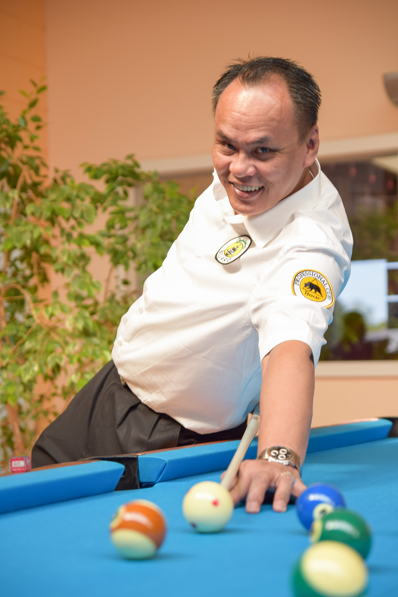 Francisco "Django" Bustamante im Jahr 2015 zu Besuch bei Dynamic-Billard